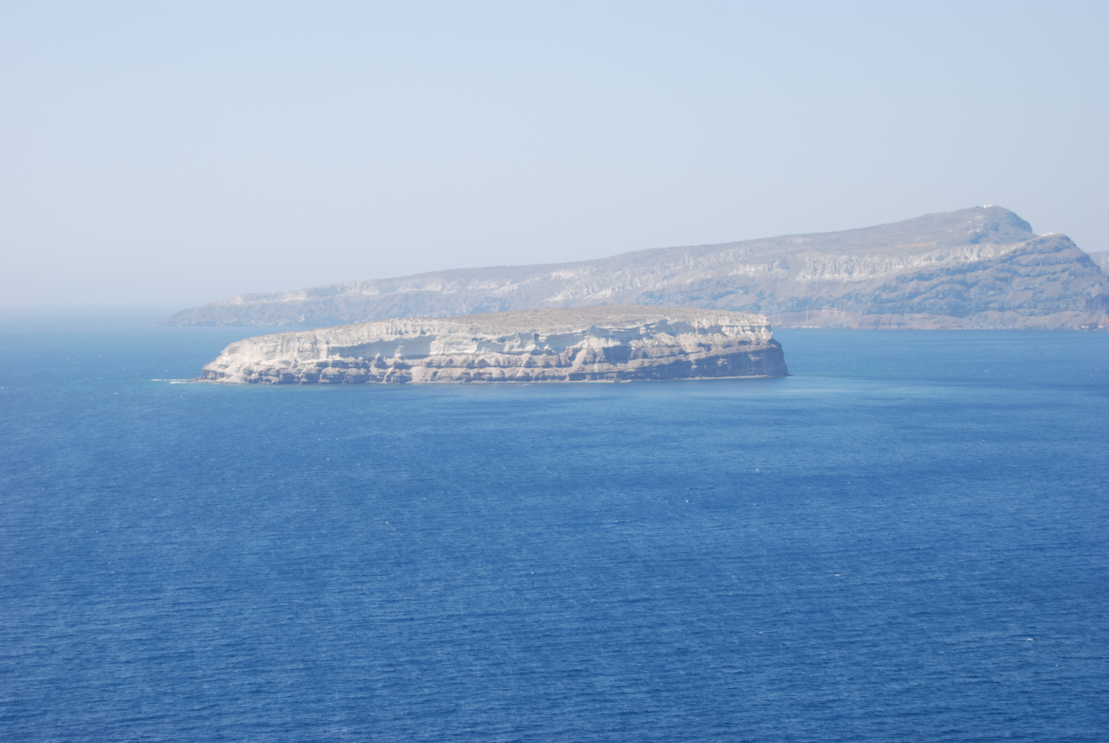 Aspronisi, Santorini, Cyclades, Greece